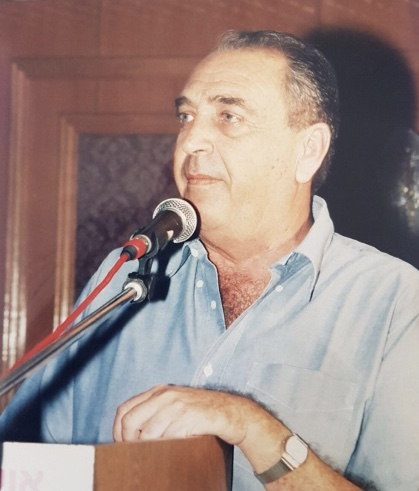 תמונה של גיורא לב